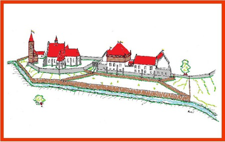 Rekonstrukční kresba Fryštátského hradu v Karviné na základě historického popisu a dochovaných staveb